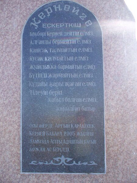 Памятник Керней